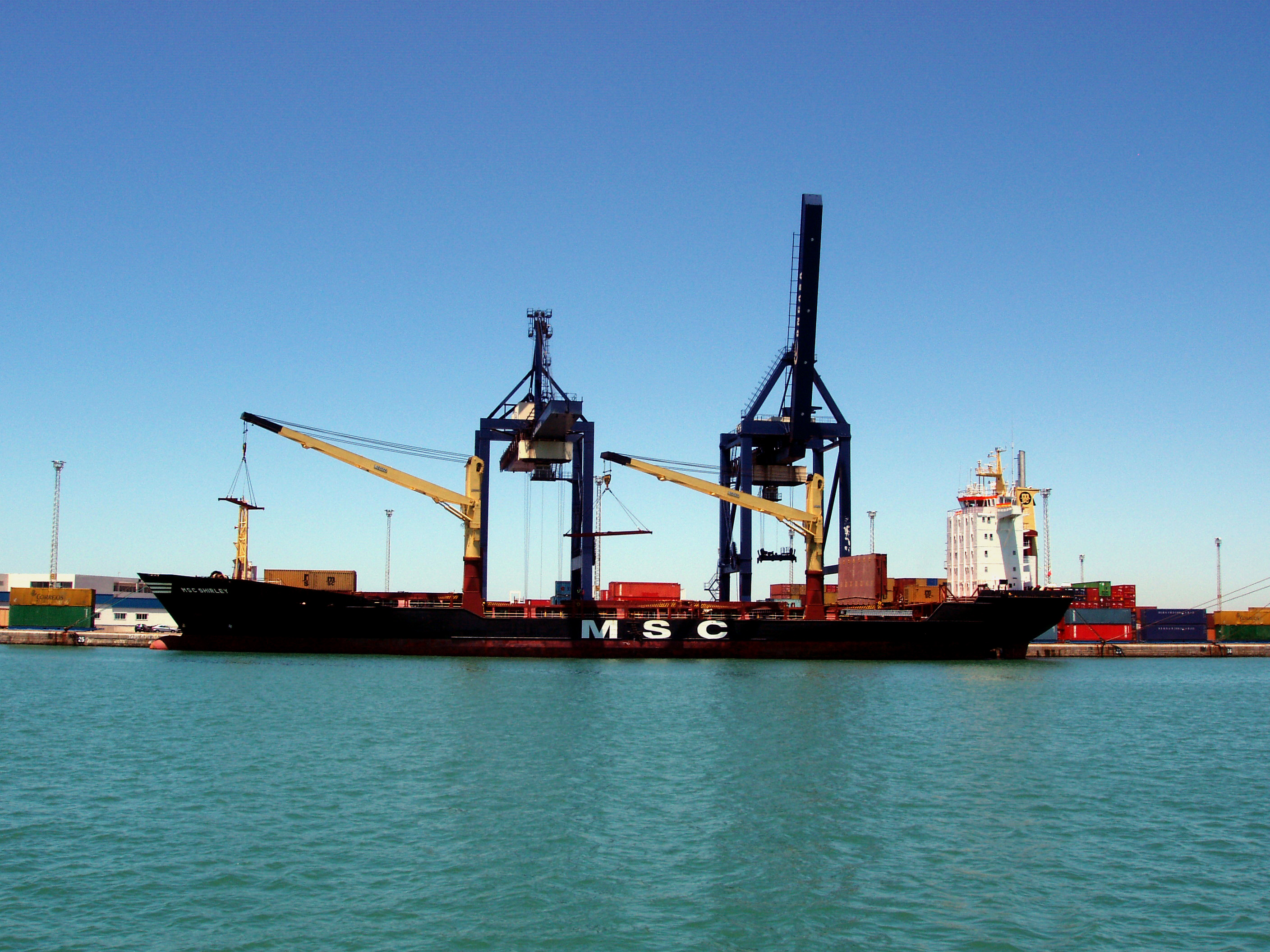 MSC Shirley, bandera de Panamá, 132 m de eslora, en el Puerto de la Bahía de Cádiz IMO Number: 8516603 Country: Panama MMSI Number: 355205000 Callsign: HPCR Length: 133m Beam: 23 m